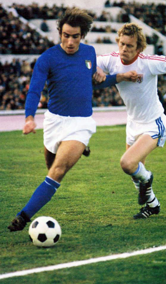 Francesco Graziani (a sinistra) in azione in maglia azzurra durante l'incontro Italia-Lussemburgo (3-0) del dicembre 1977, giocato allo stadio "Olimpico" di Roma e valevole per le qualificazioni al campionato mondiale di calcio 1978.